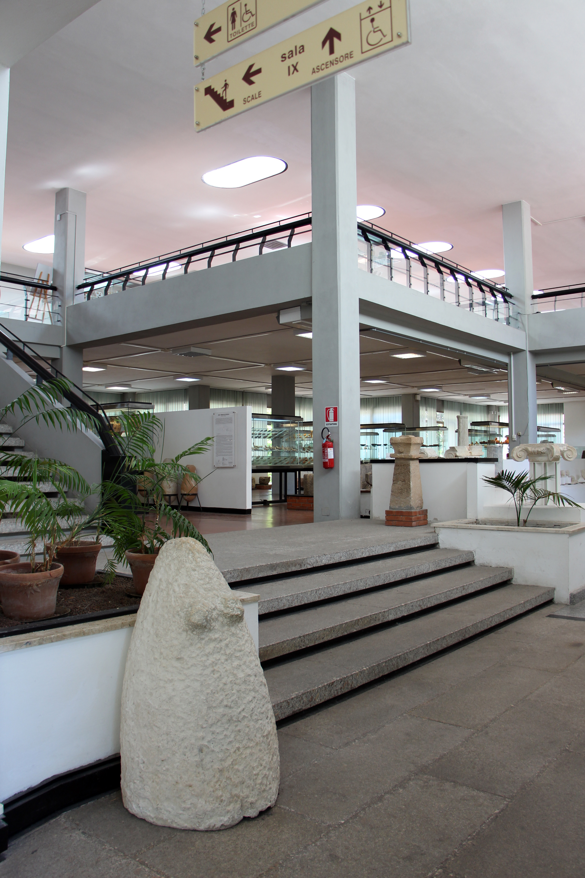 Museo archeologico nazionale G.A. Sanna - MIBAC The making of this document was supported by Wikimedia CH. (Submit your project!) For all the files concerned, please see the category Supported by Wikimedia CH. This is a photo of a monument which is part of cultural heritage of Italy.